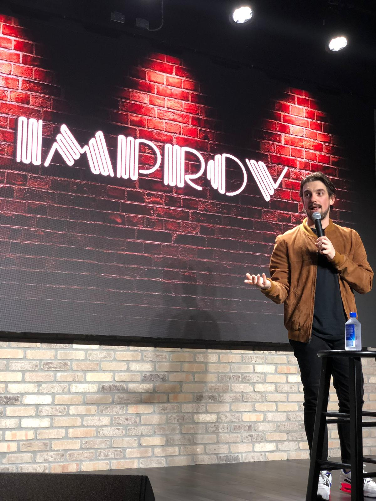 Fotografía de Nacho Redondo estrenando su nuevo show "Discapacitado" en Miami IMPROV, siendo el primer show en español en la historia del reconocido local.